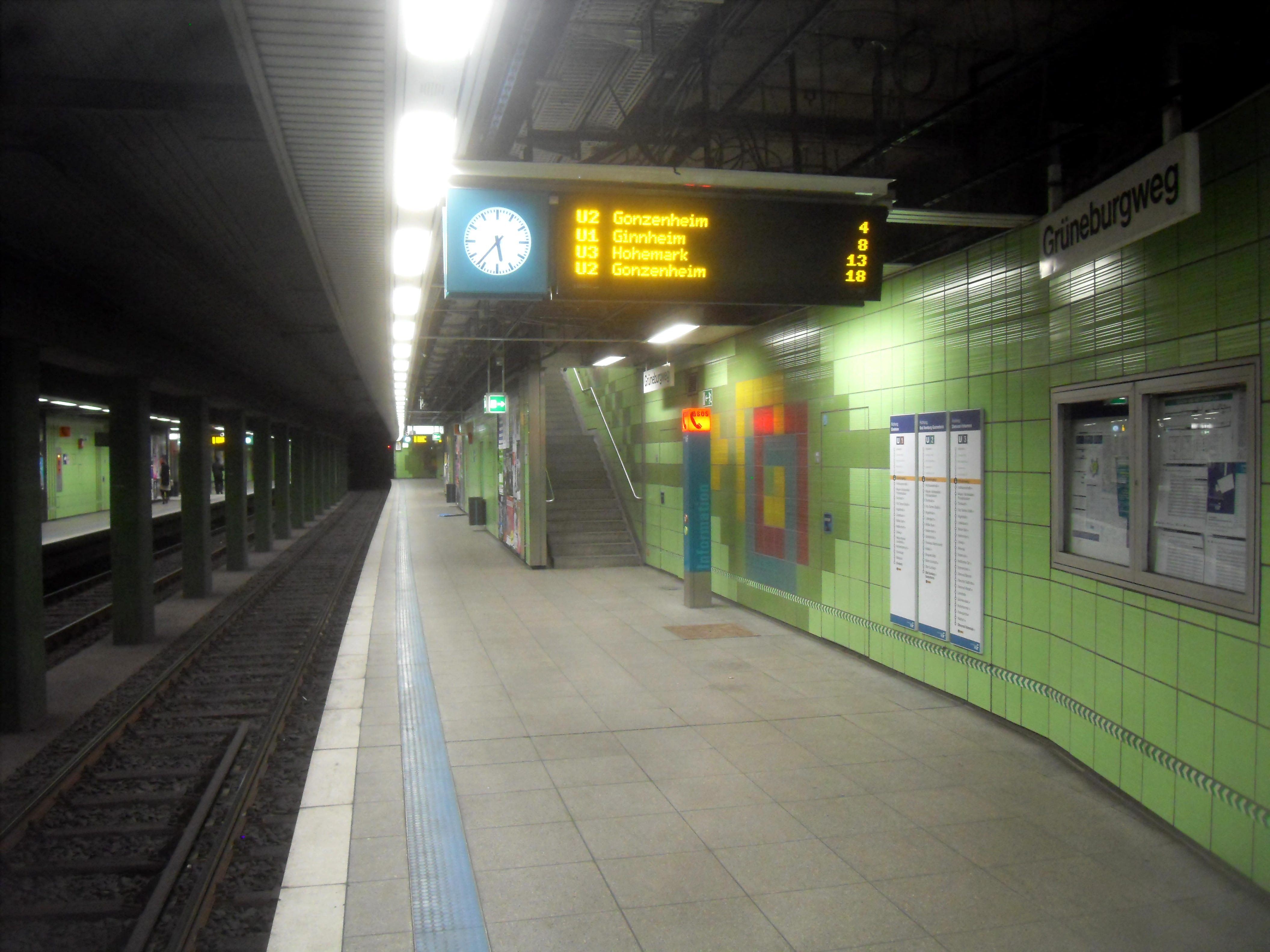 Bahnsteig des U-Bahnhofs Grüneburgweg (Richtung Ginnheim, Gonzenheim, Hohemark) der U-Bahn Frankfurt auf den Linien U 1 bis U 3 in Hessen (Deutschland)